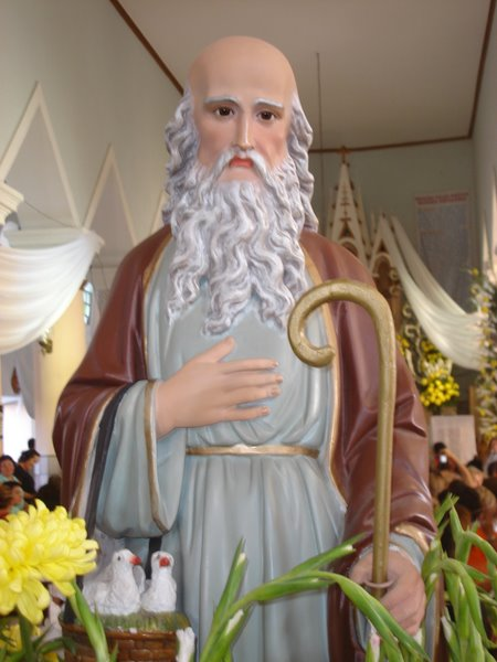 fotografia que retrata a imagem de São Joaquim, pai de Maria, avô de Jesus Cristo. Está no altar-mor da Matriz de Sant'Ana de Currais Novos-RN-Brasil.